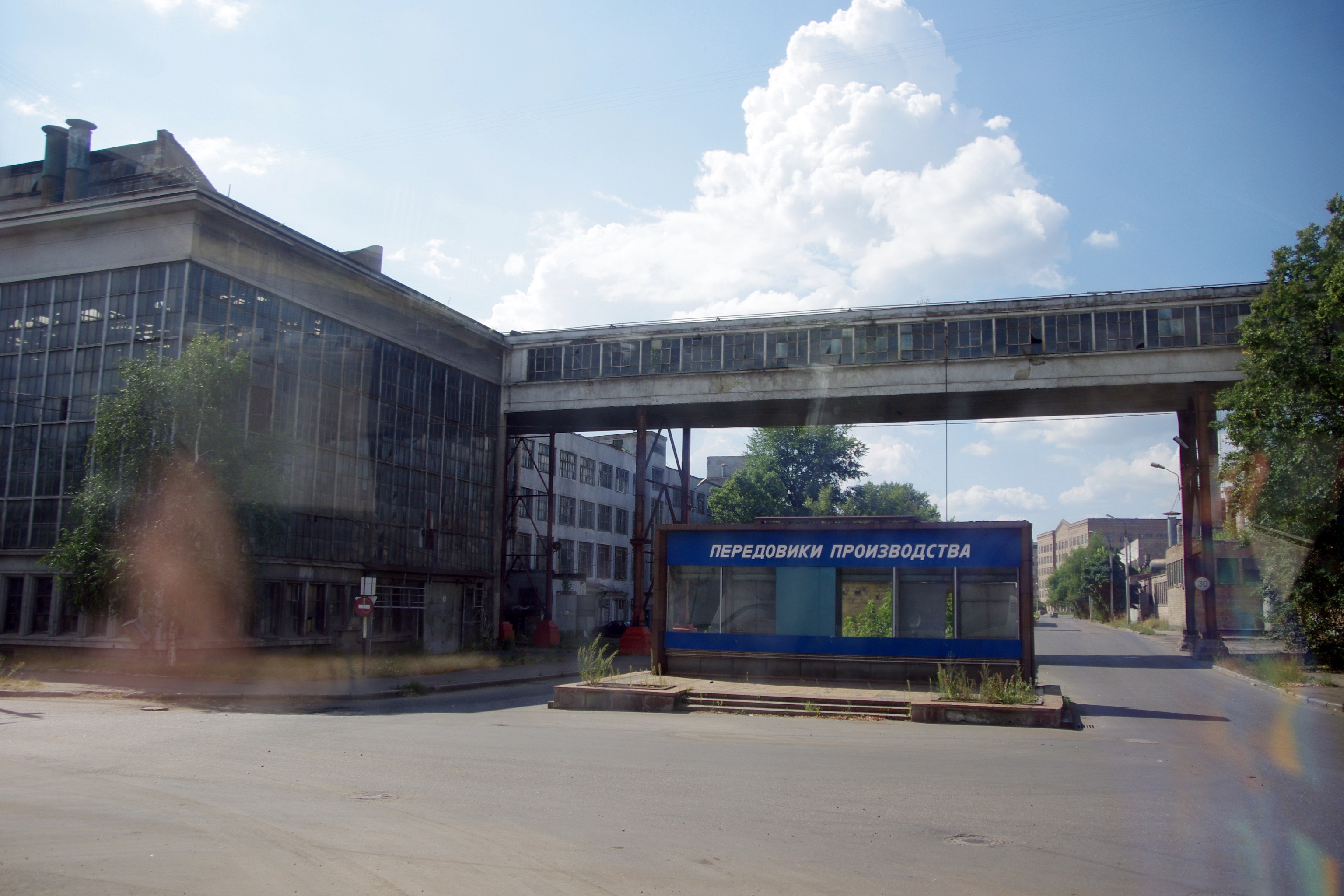 Экскурсия на ЗИЛ